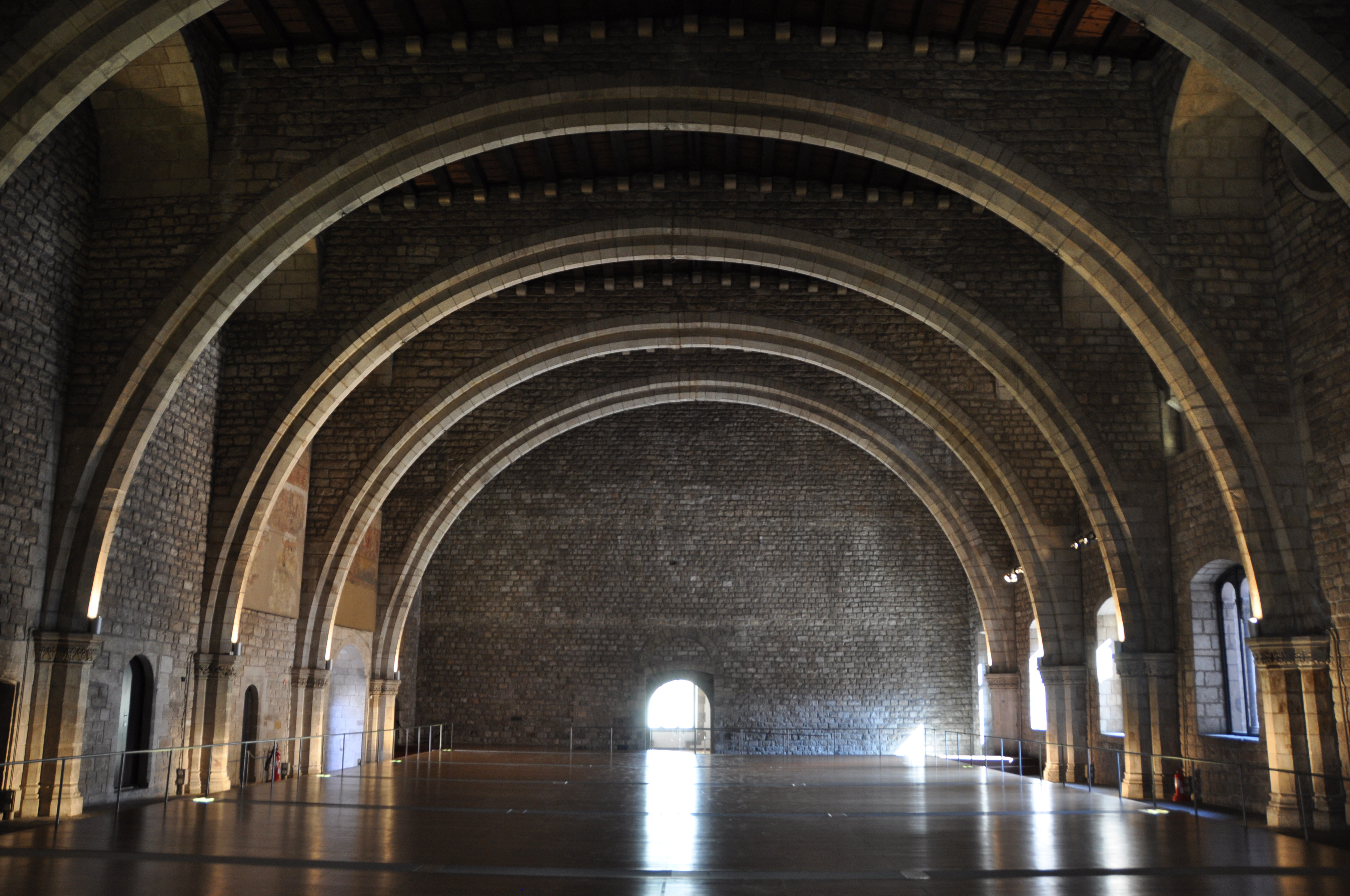 Palau reial major salo del tinell Interior Arcs diafragma MUHBA Museu d'Història de Barcelona